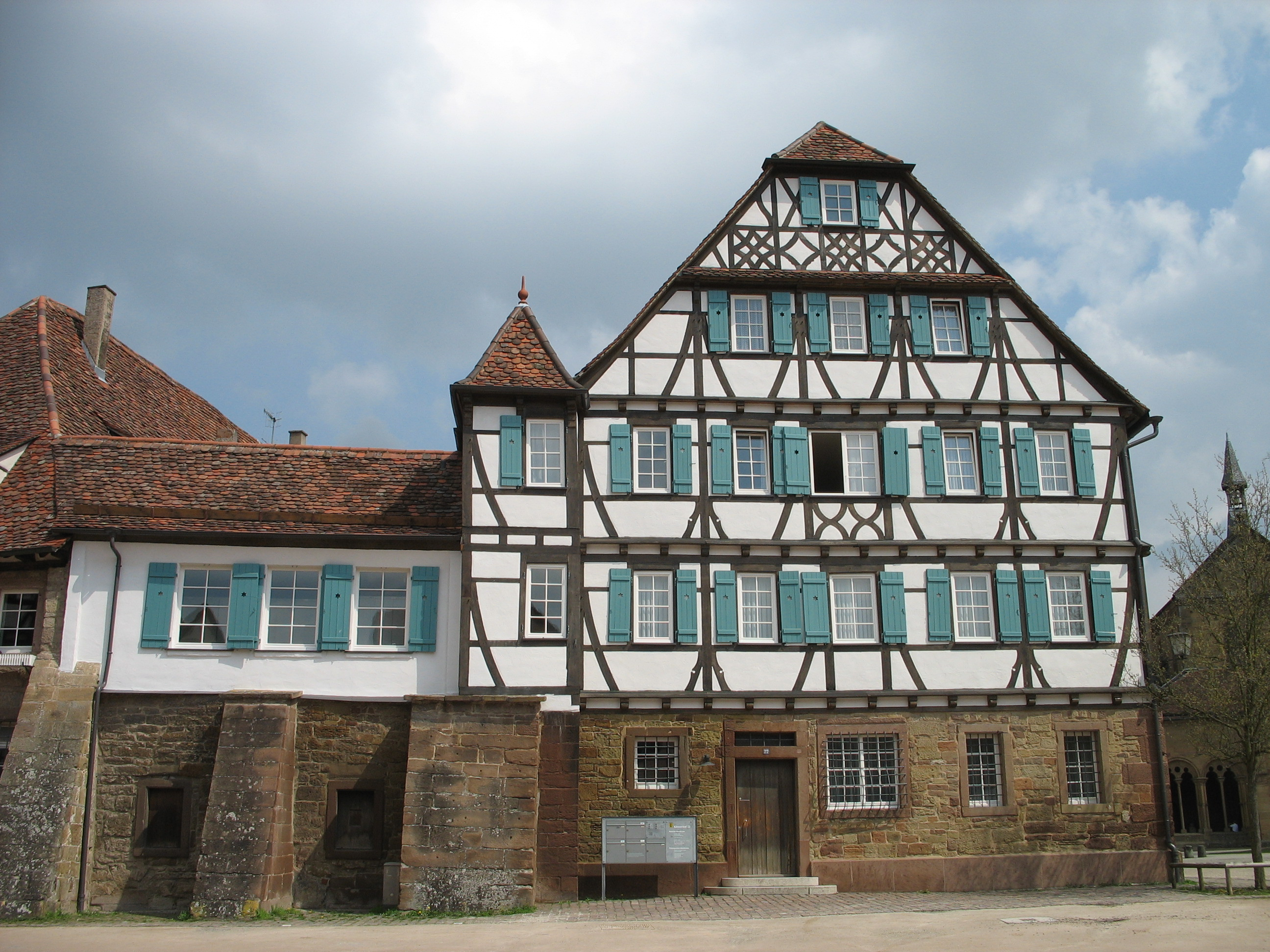 Kloster Maulbronn